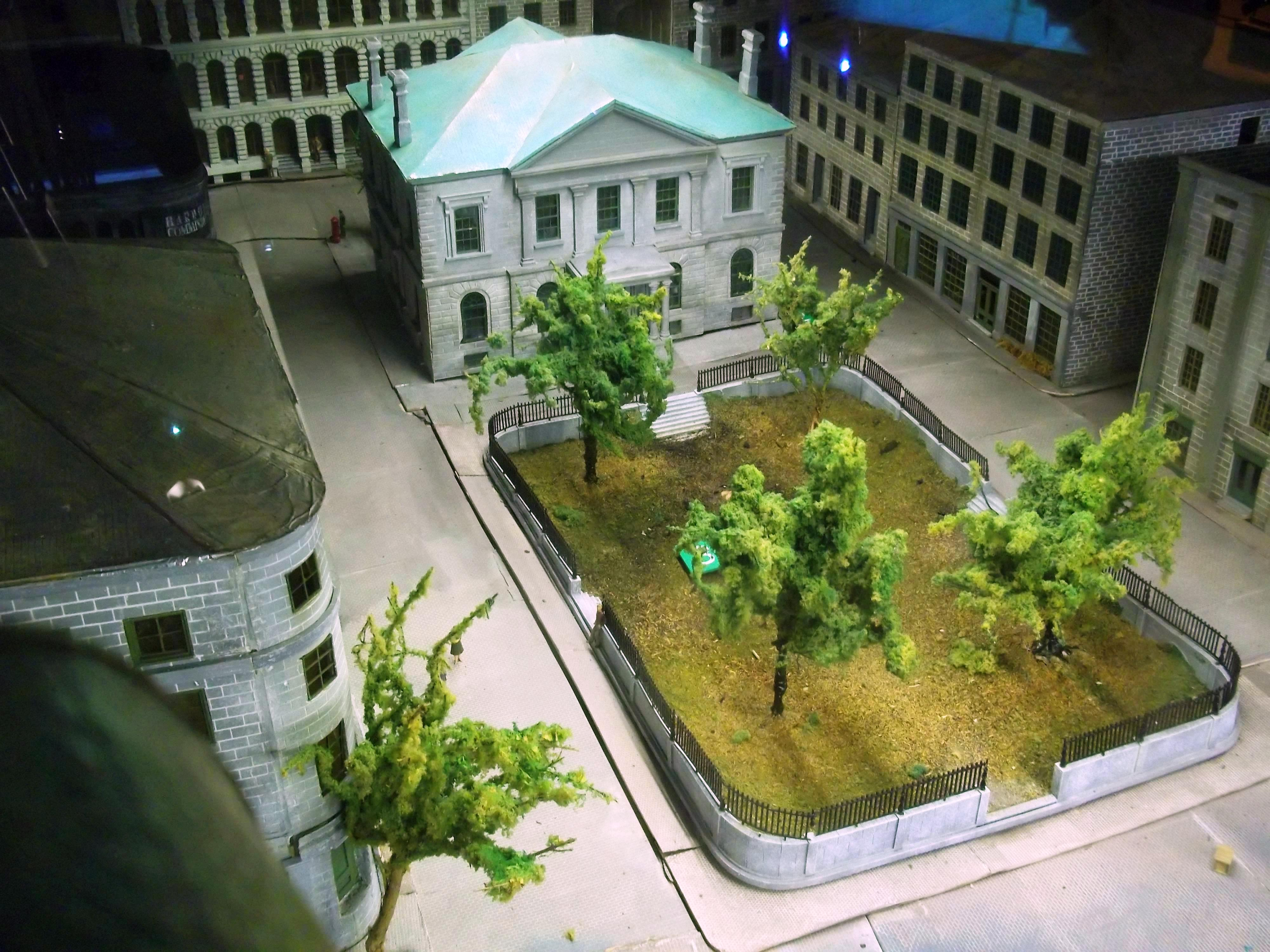 Maquette du square de la Douane, Pointe-à-Callière, Montréal. « En 1836, le gouvernement du Bas-Canada exproprie l'ancienne place du marché et fait construire la maison de la Douane au centre. La partie sud de la place est réaménagée avec arbres, clôtures de fer forgé et fontaine : elle est baptisée square de la Douane. C'est en 1892, à l'occasion du 250e anniversaire de la fondation de Montréal, qu'elle prend le nom de place Royale. » Vieux-Montréal